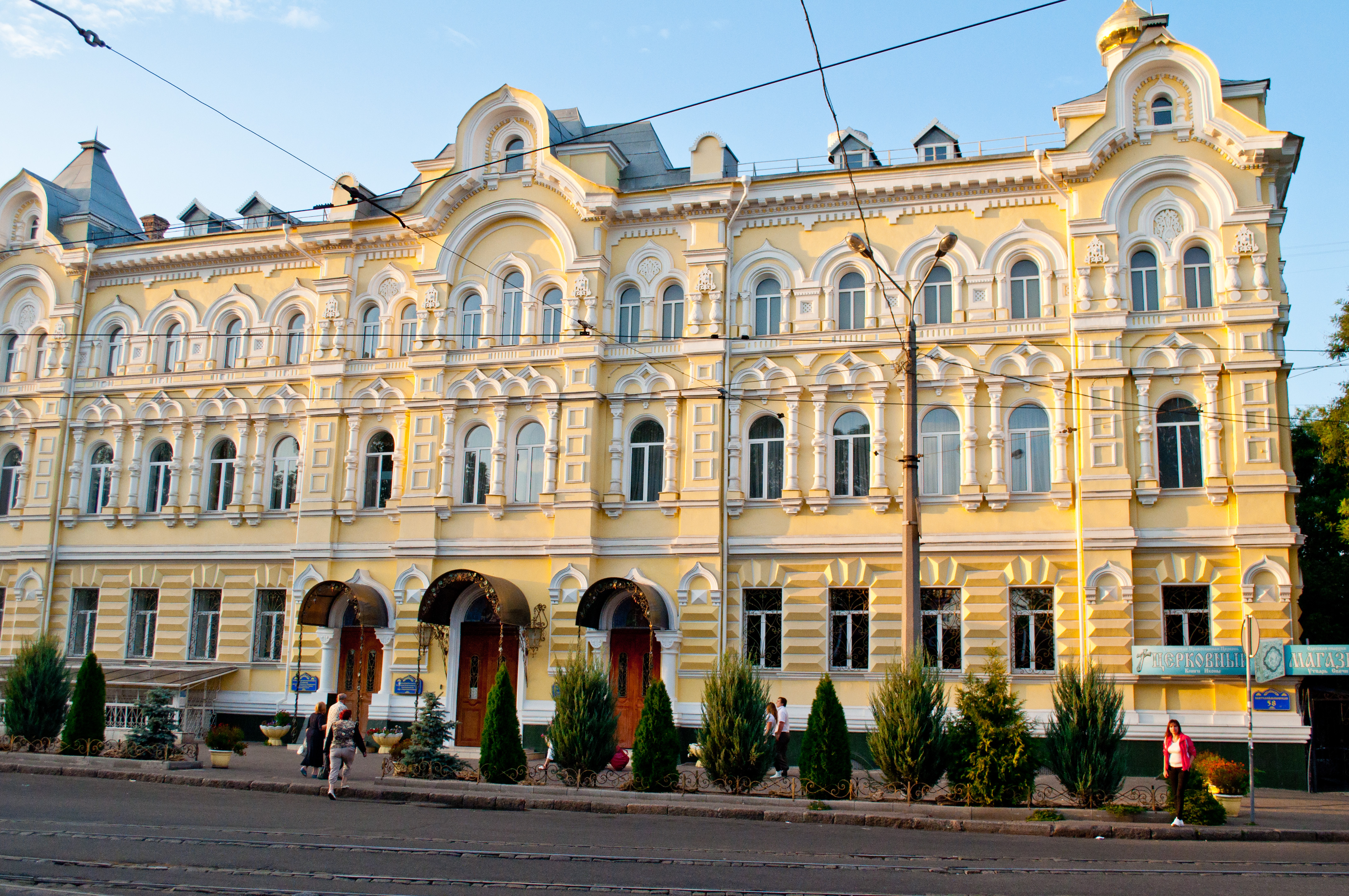 Будівля Андріївського подвір’я Афонського монастиря